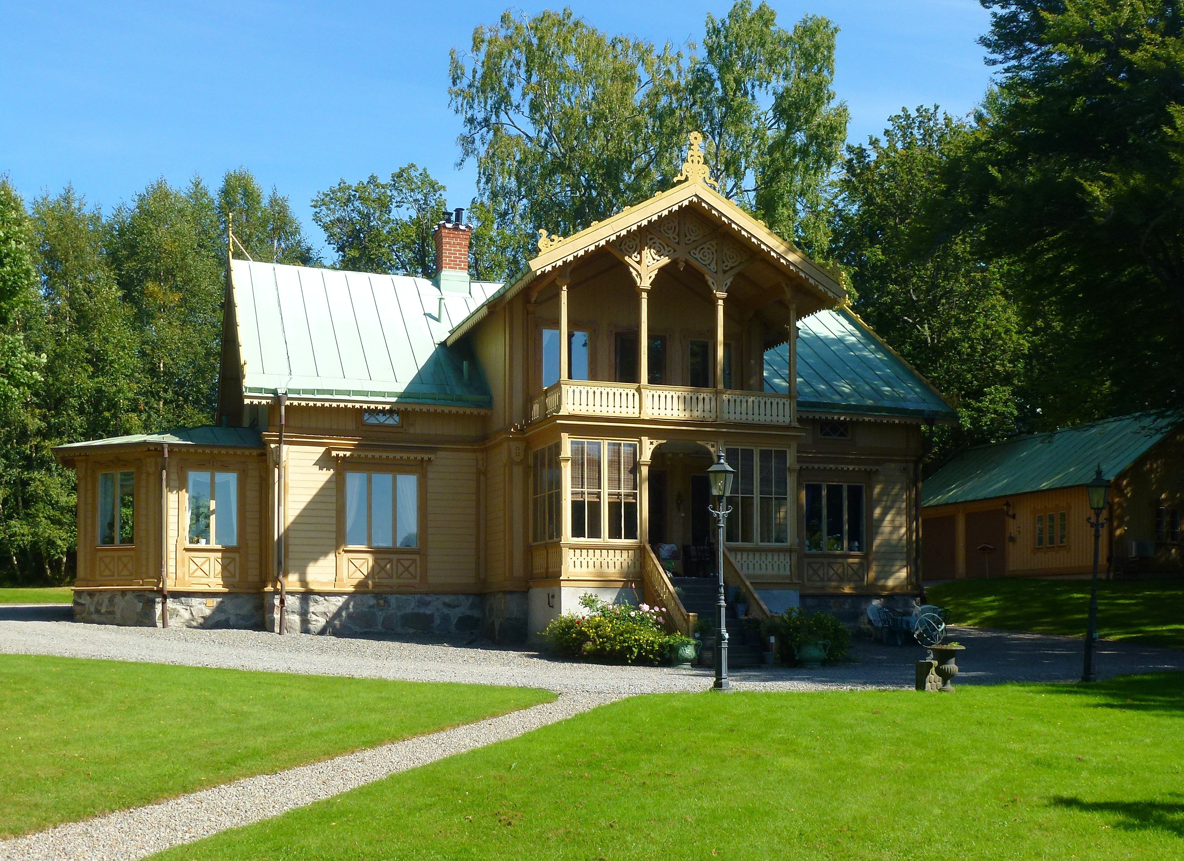 Villa Lindängen i Lännersta, Nacka